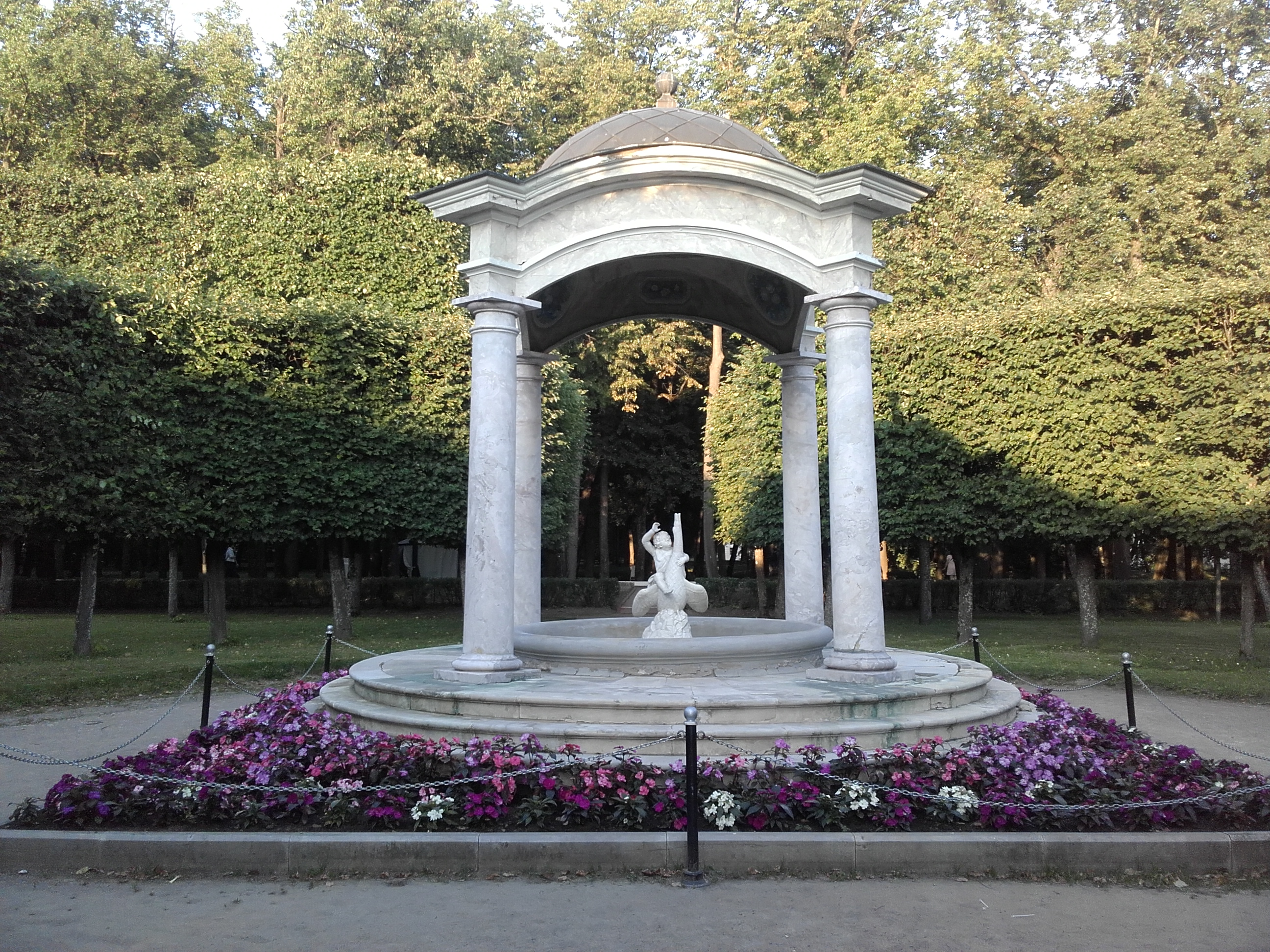 Альтанка "Рожевий фонтан" у музею-садибі" Архангельське. Фото червень 2016